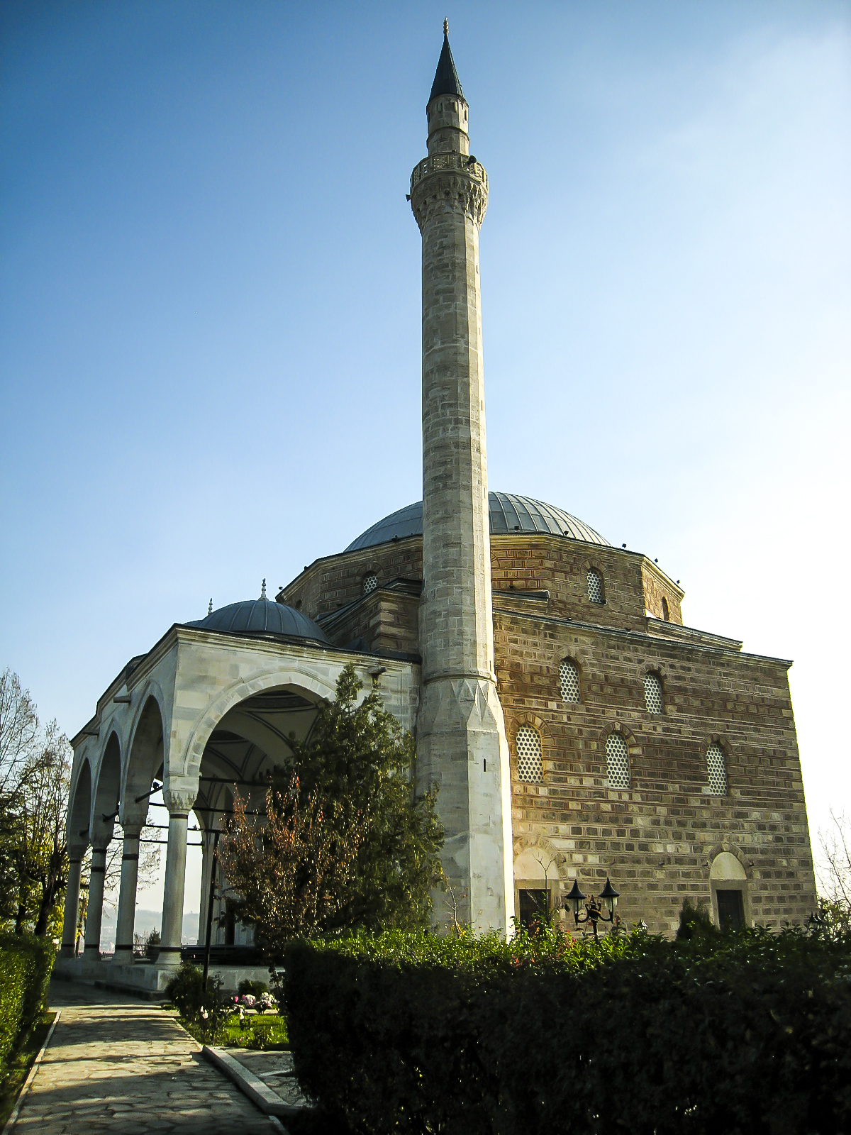 Мустафа пашината џамија во Скопје